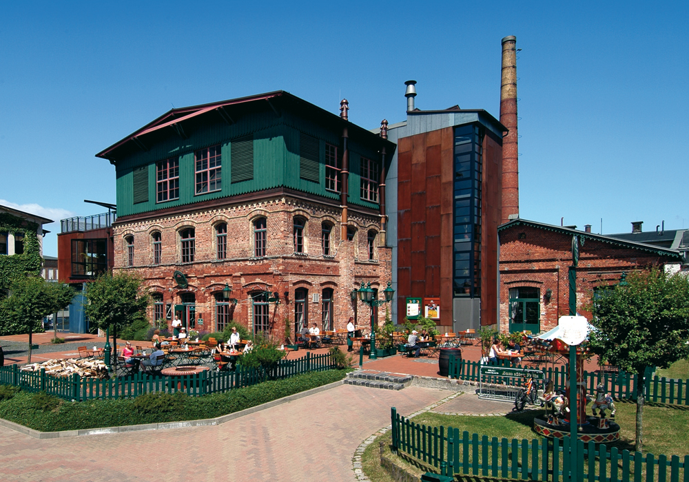 Stralsunder Brauerei mit dem Braugasthaus "Zum Alten Fritz"